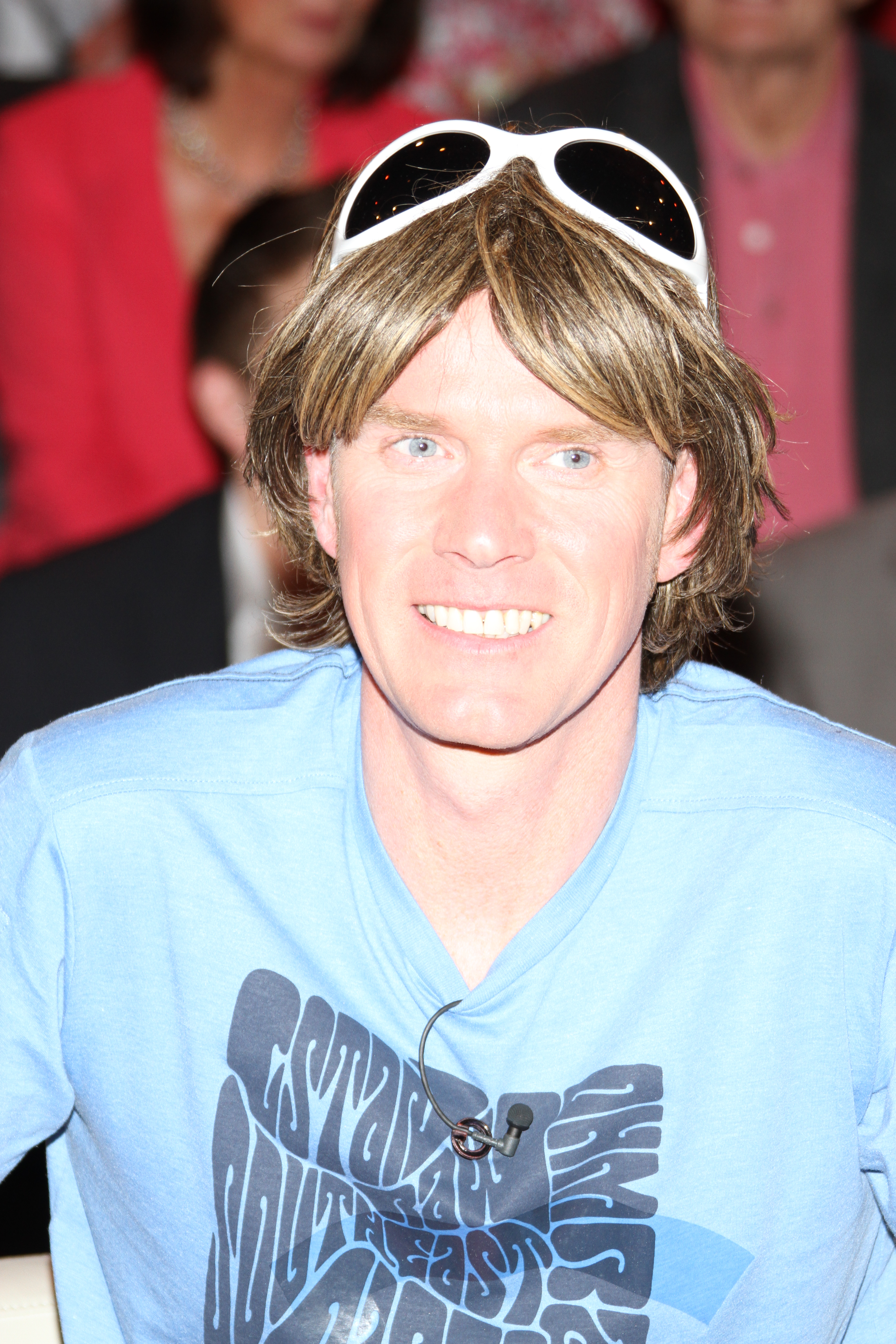 Mickie Krause (* 21. Juni 1970; eigentlich Michael Engels) ist ein deutscher Sänger und Entertainer aus Wettringen.